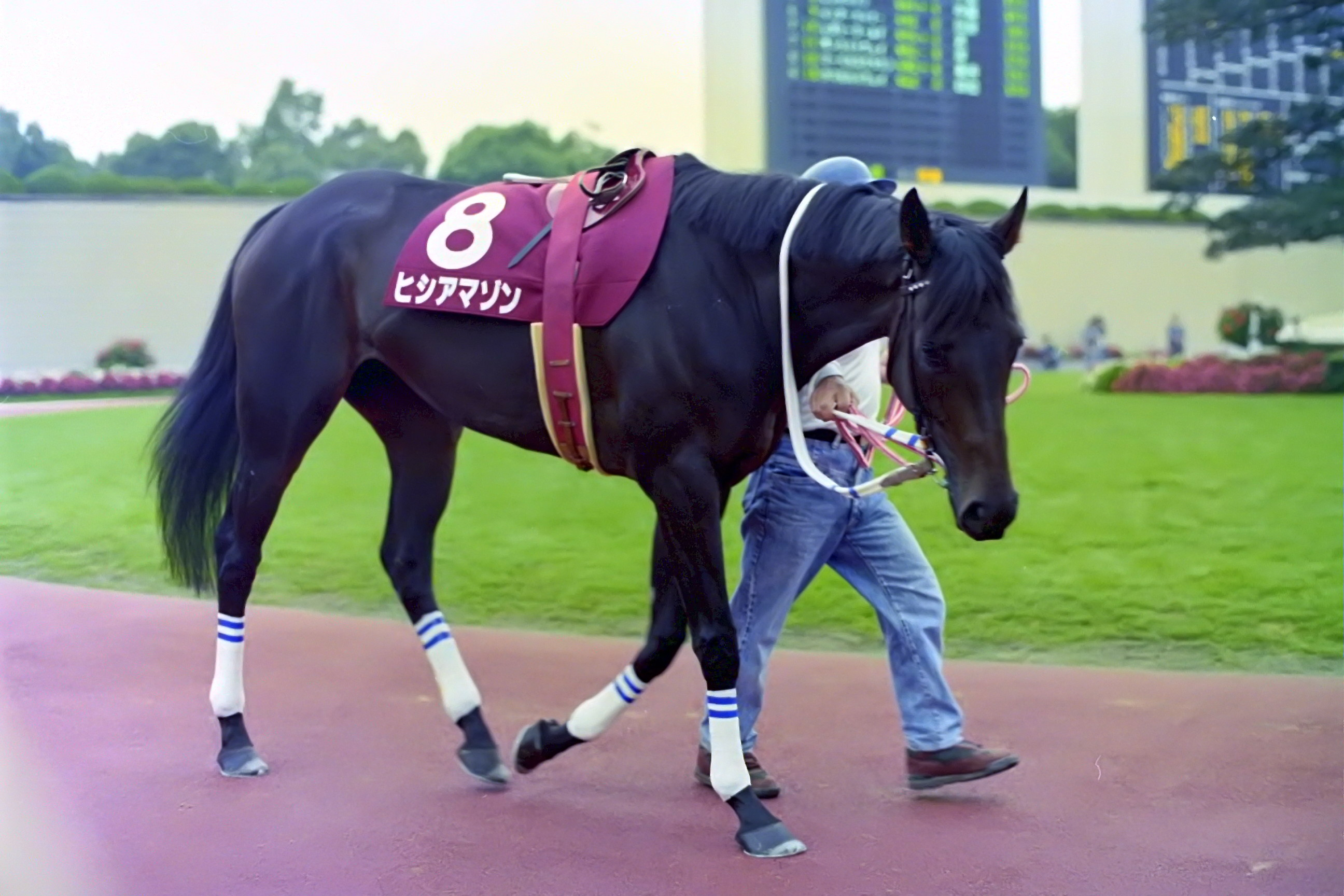 ヒシアマゾン 1995年10月8日 京都競馬場